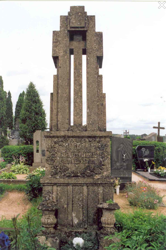 Vinco Karoblio kapas Subačiuje